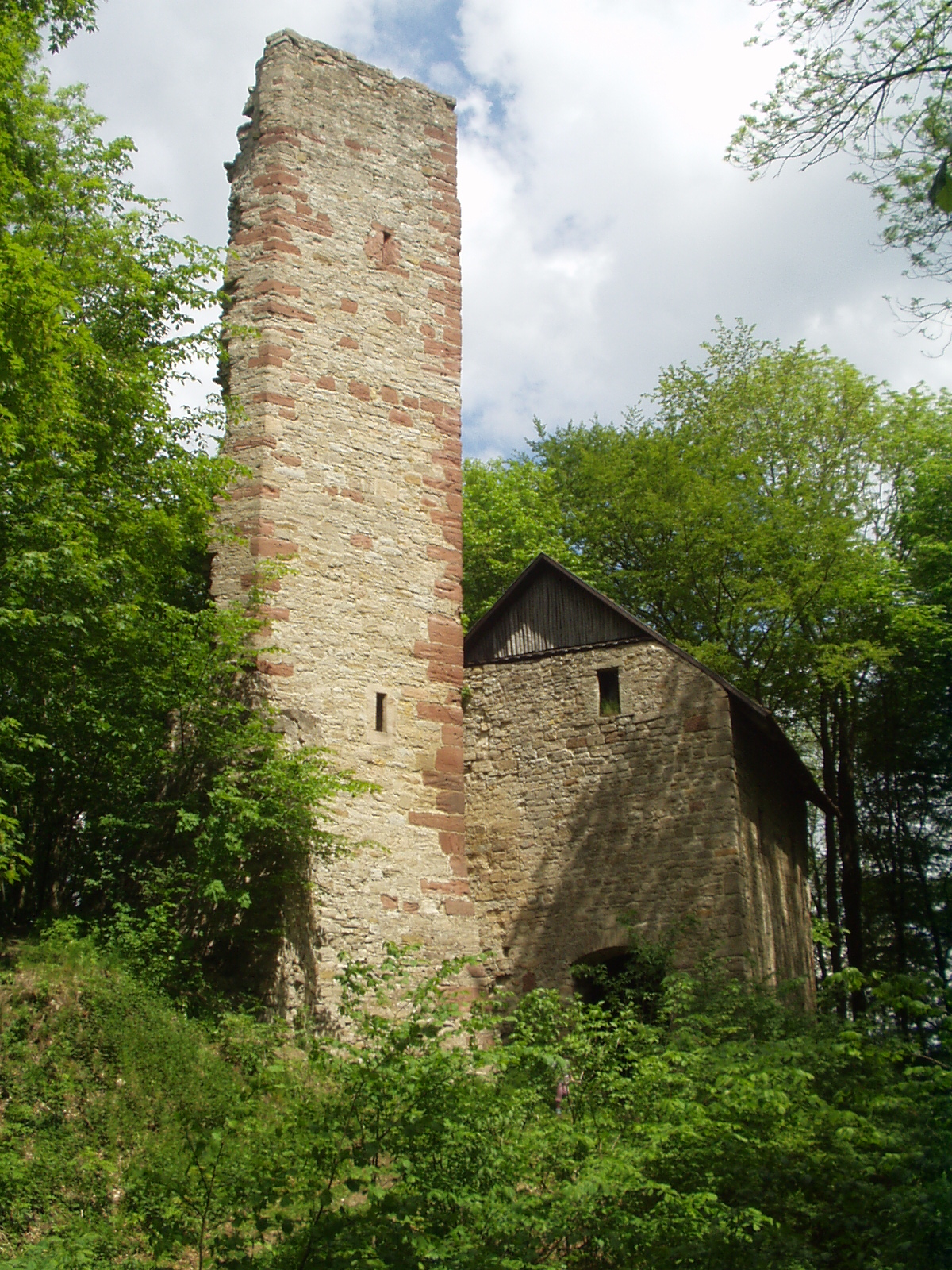 Die Boyneburg, Werra-Meißner-Kreis, Hessen, Germany